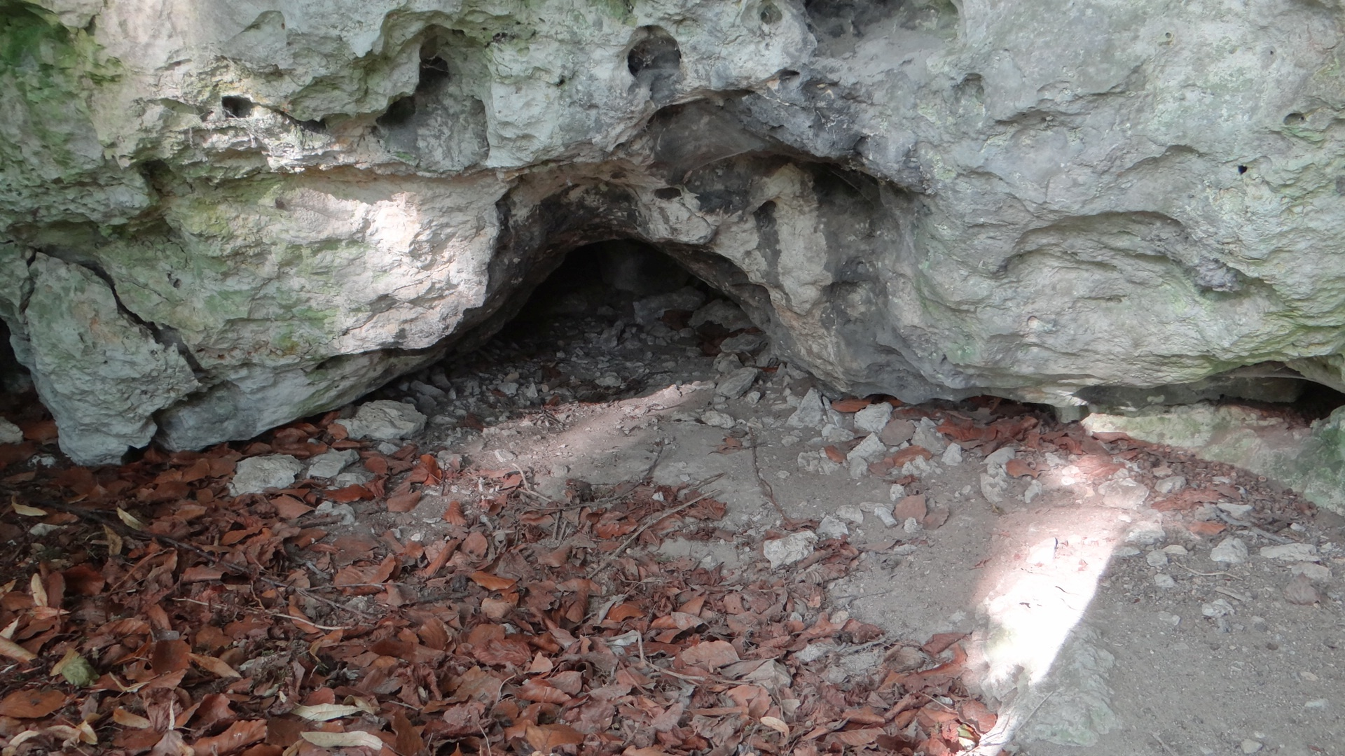 Schronisko przy Ziemi w sklae Oczko w Parku Jurajskim między smoleniem i Złożeńcem na Wyżynie Częstochowskiej